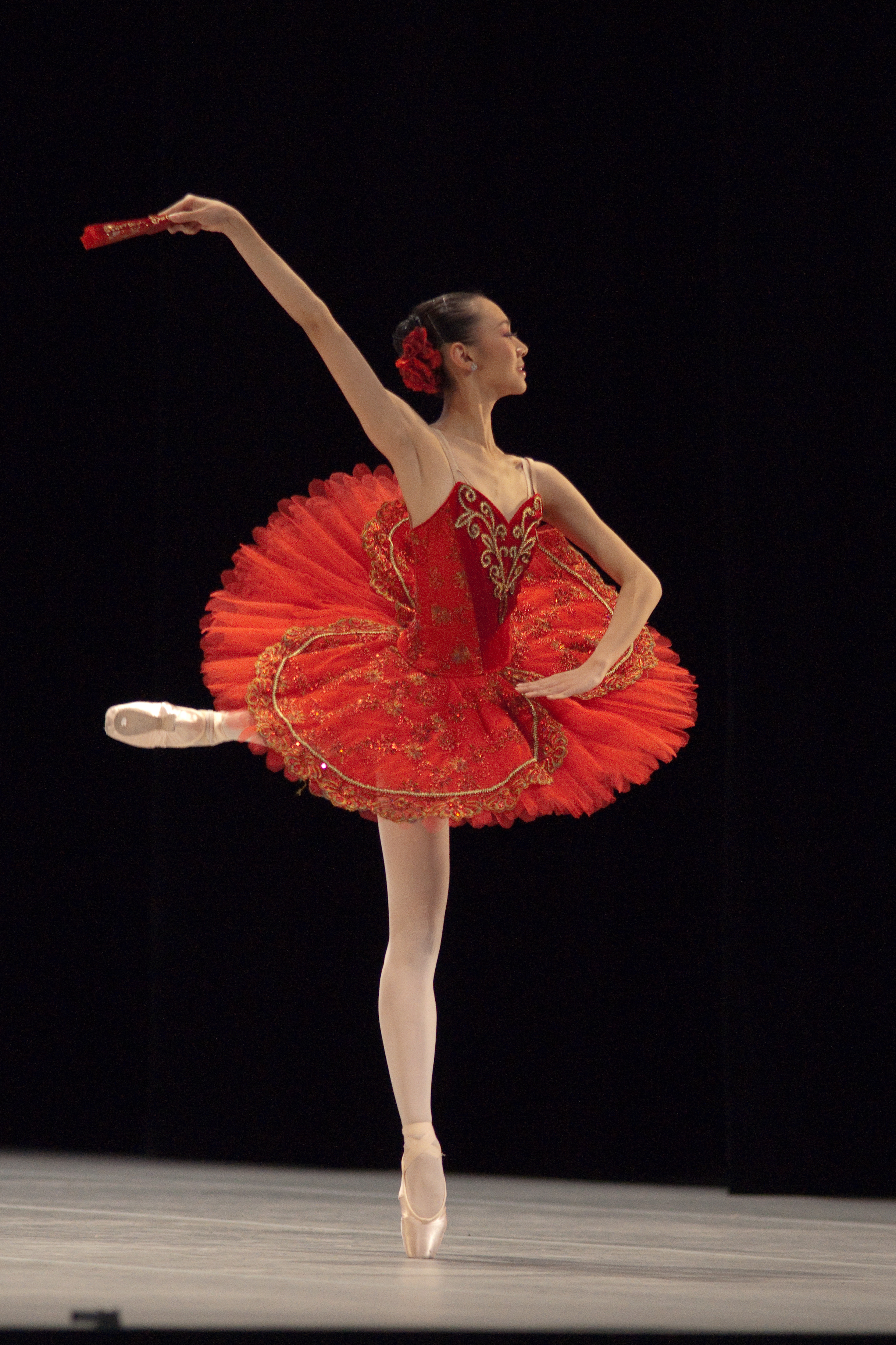 Variation extraite de Don Quichotte au Prix de Lausanne 2010. The making of this document was supported by Wikimedia CH. (Submit your project!) For all the files concerned, please see the category Supported by Wikimedia CH.